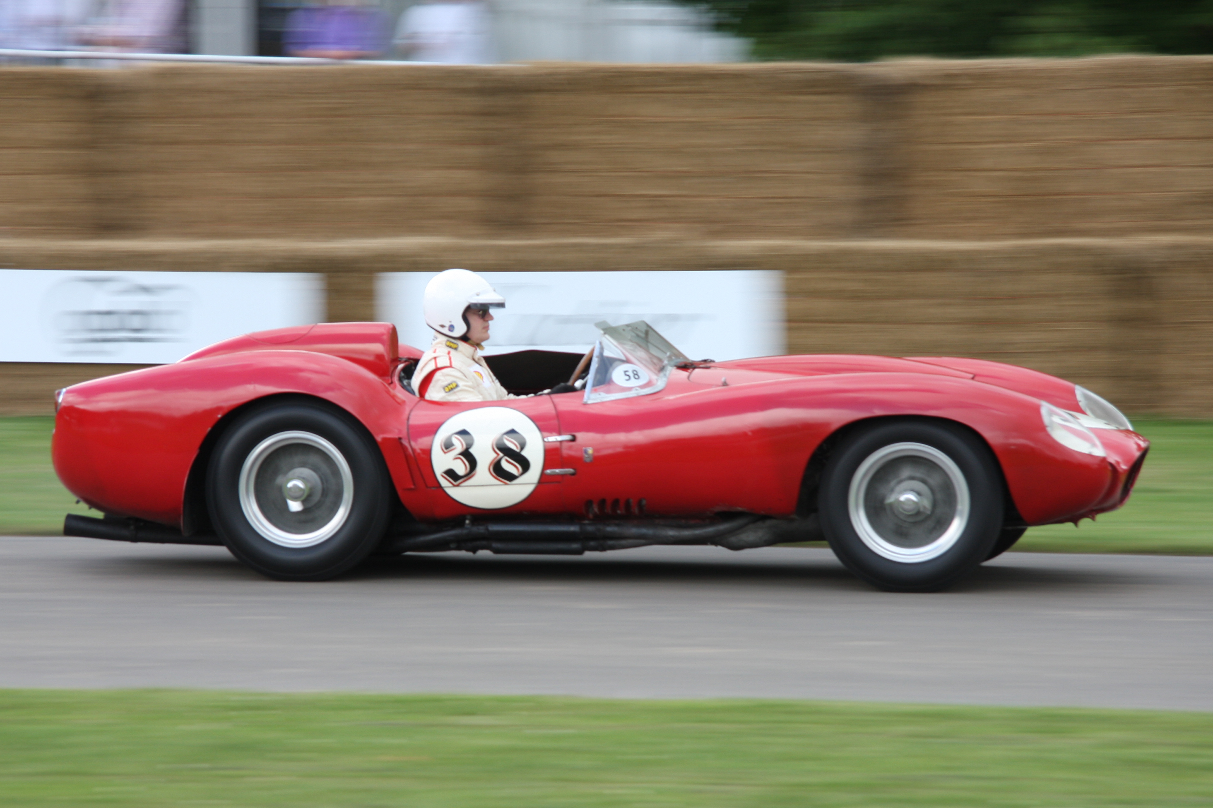 Built 1957. 3 litre V12